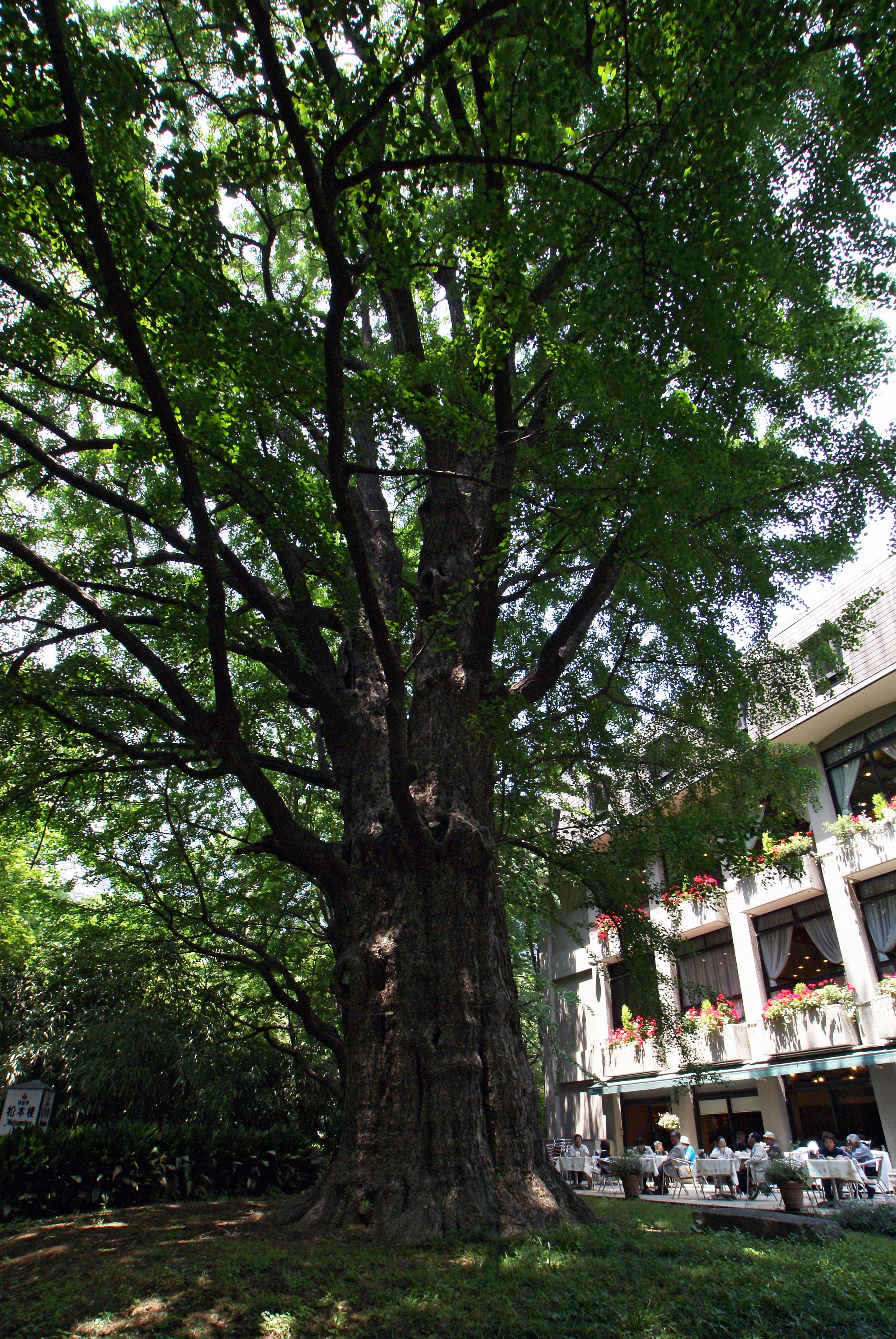 Hibiya Park in Chiyoda-ku, Tokyo, Japan